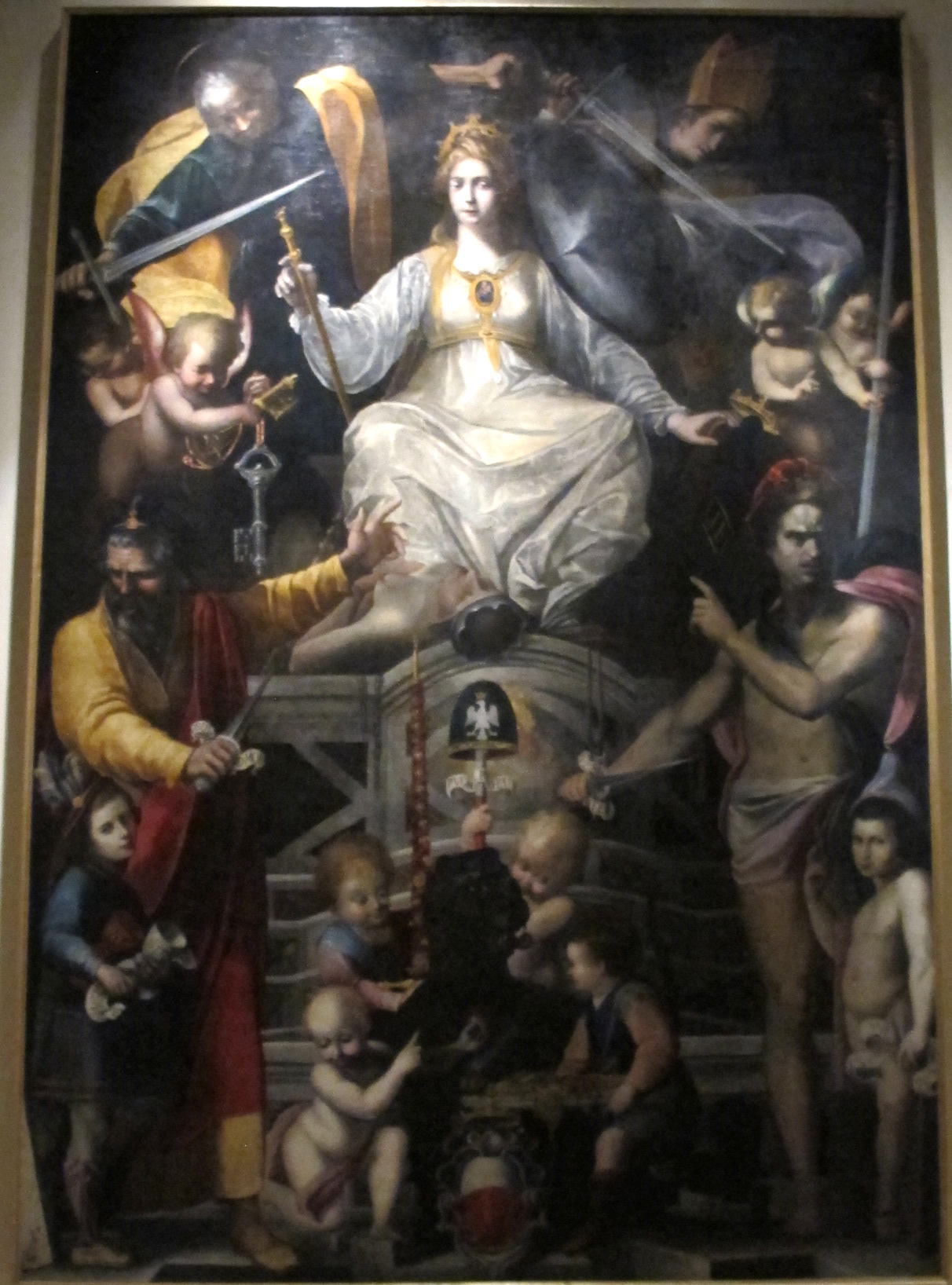 Museo nazionale di Villa Guinigi - MIBAC This is a photo of a monument which is part of cultural heritage of Italy.